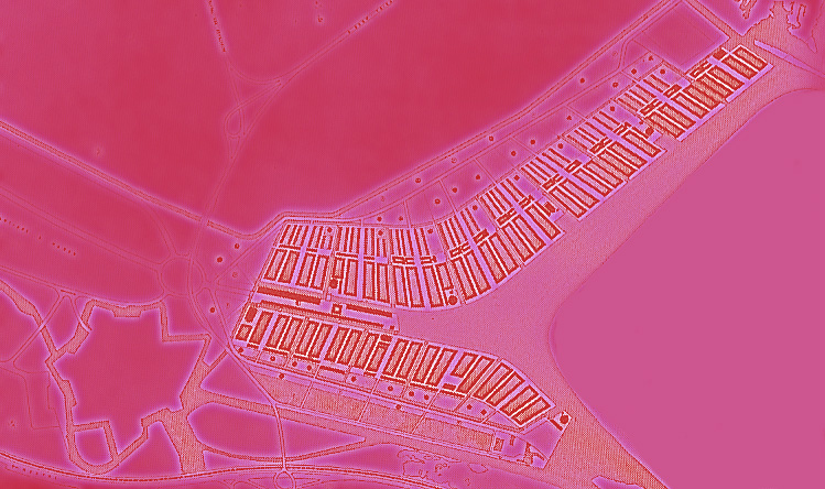 autore: Caterina Salvador anno: 2007